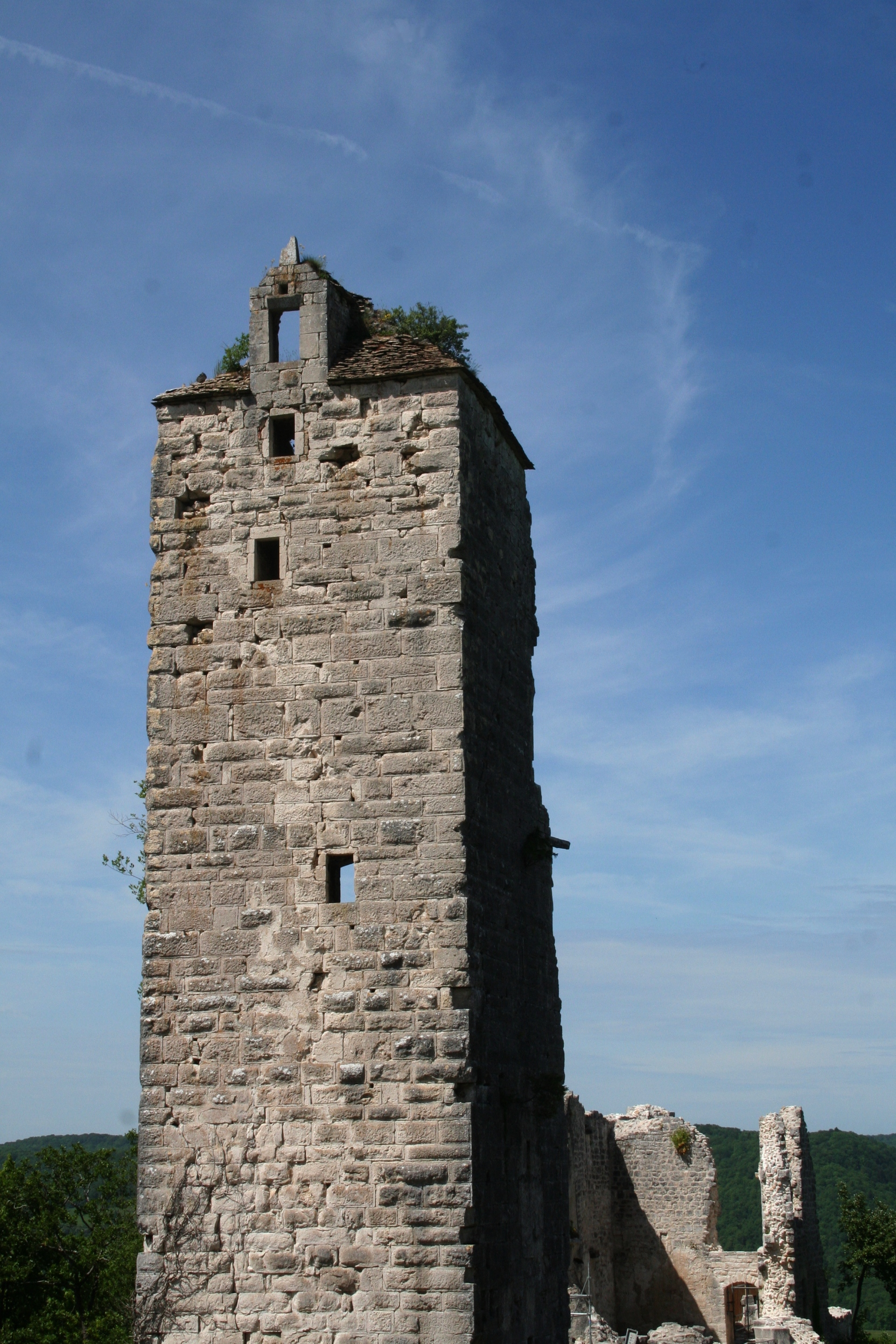 Donjon du château de Scey à Chassagne-Saint-Denis (Doubs)